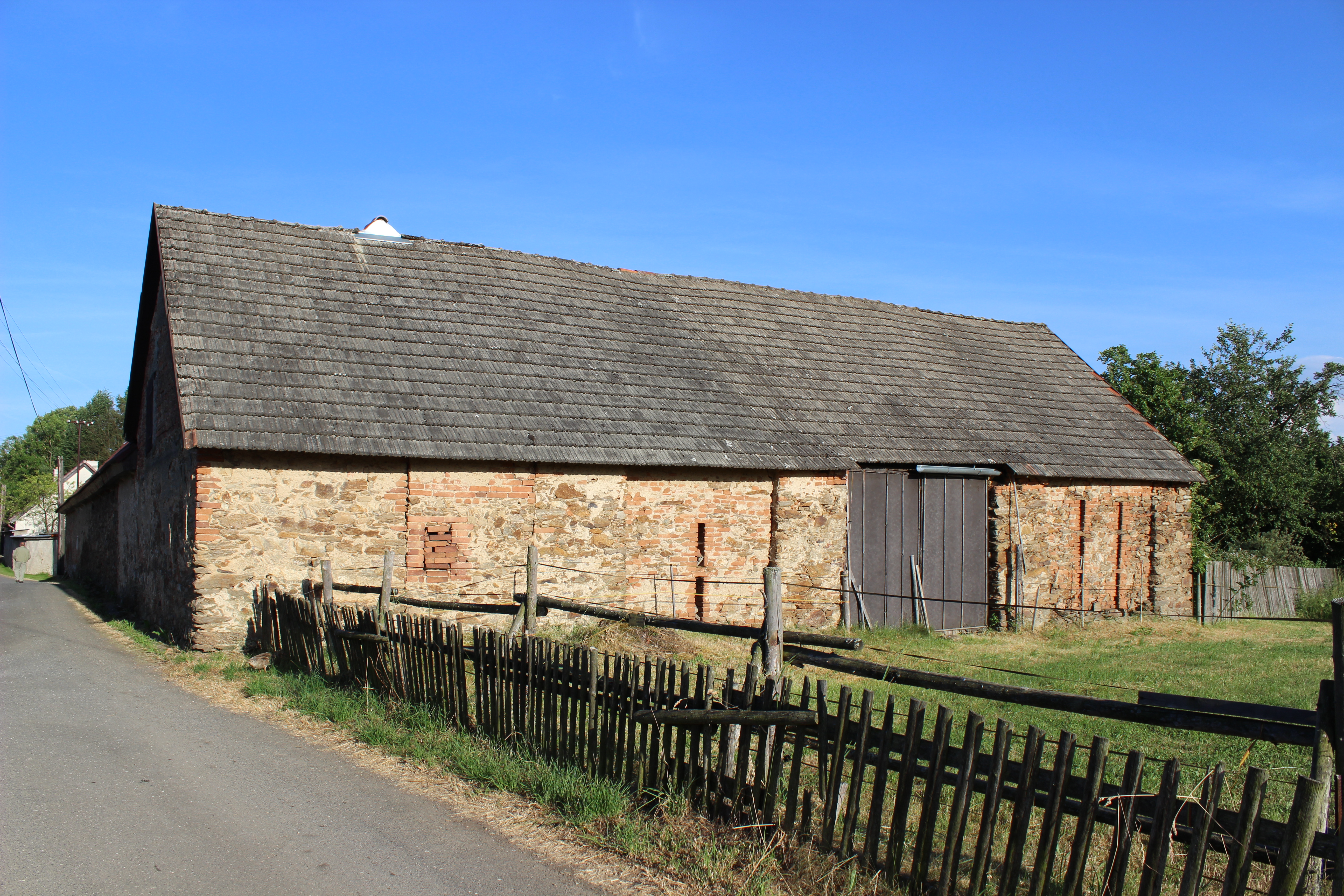 Dům číslo popisné 16 v Kačerově, části Lokte v okrese Benešov.